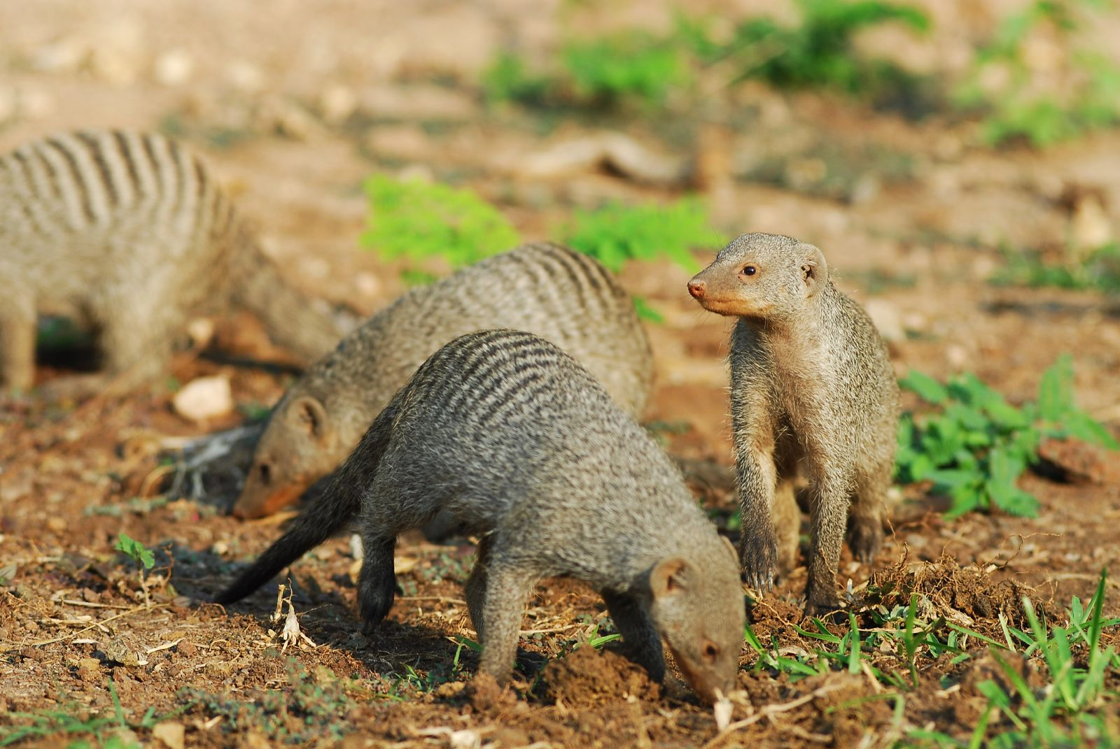 Botswana, Chobe, Kasane